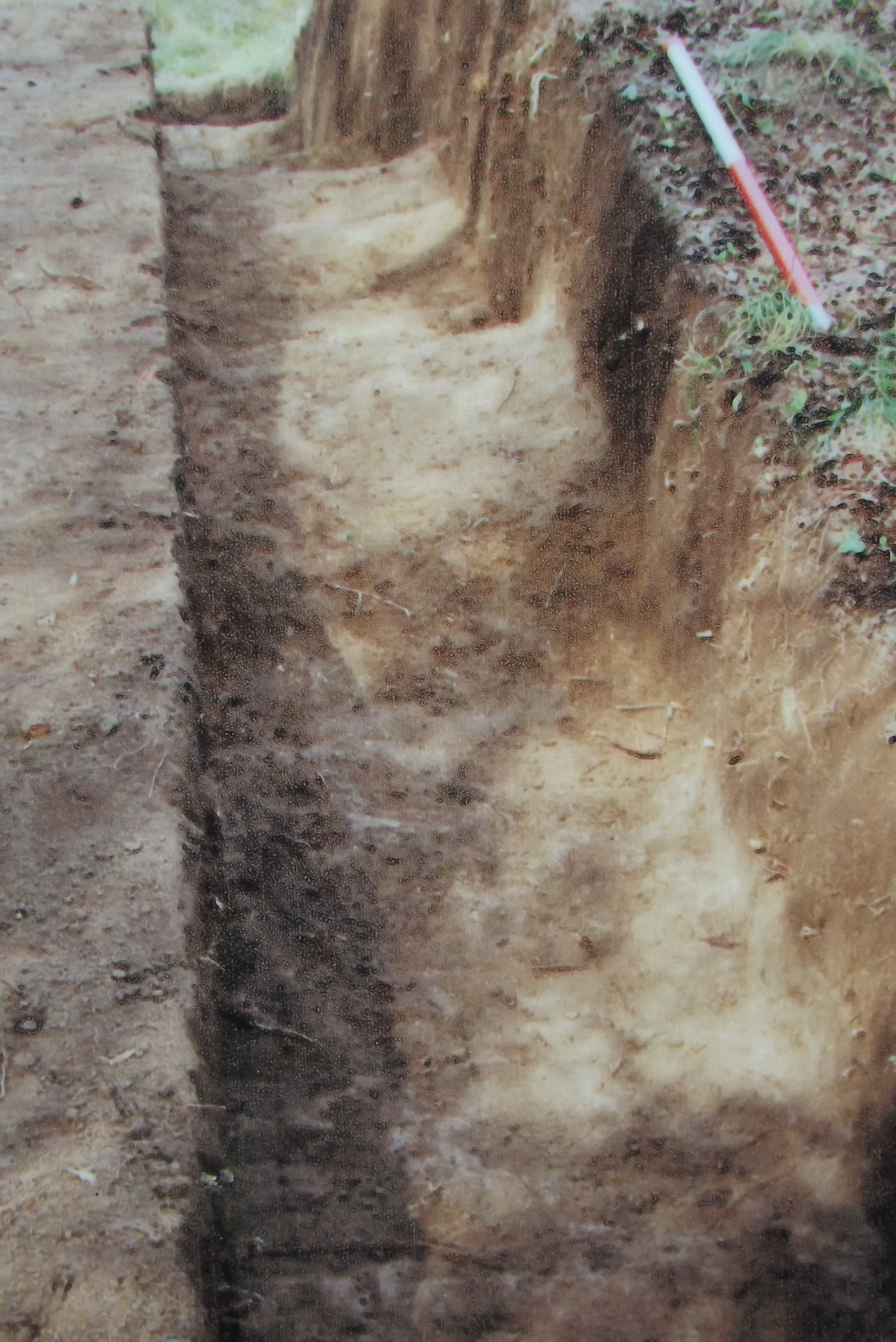 Örsúr várának nyomai. Ásatási árok a Latorvárhegyen, Sály